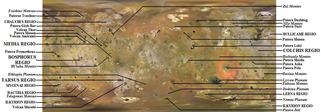 Carta de la superficia d'Io. En majusculas, lo nom dei regions dau satellit, en gras, lo nom dei volcans principaus e en italic lo nom dei montanhas importantas.